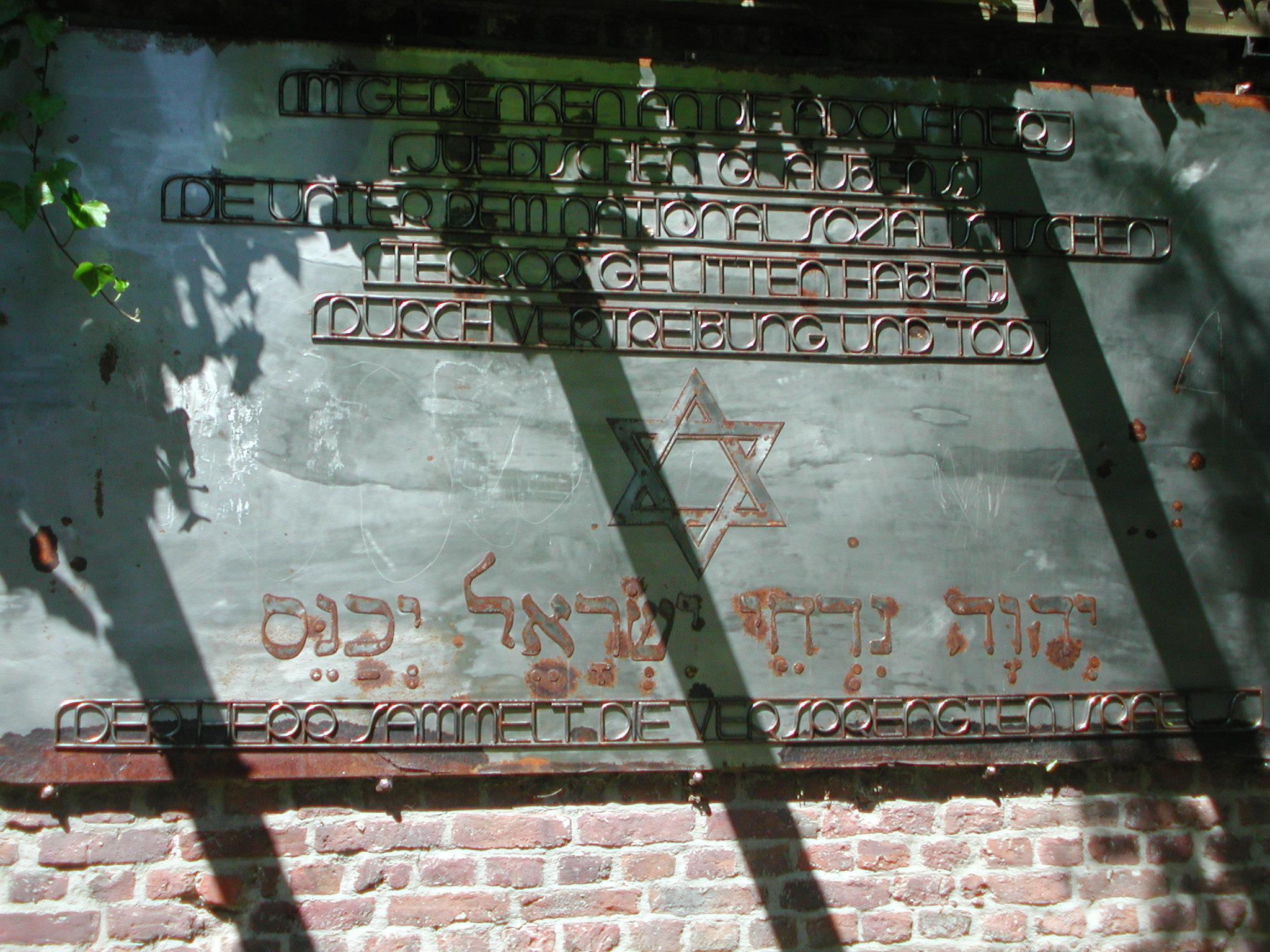 Gedenktafel für die ehemaligen jüdischen Schüler des Gymnasium Adolfinum Moers (Haupttafel)